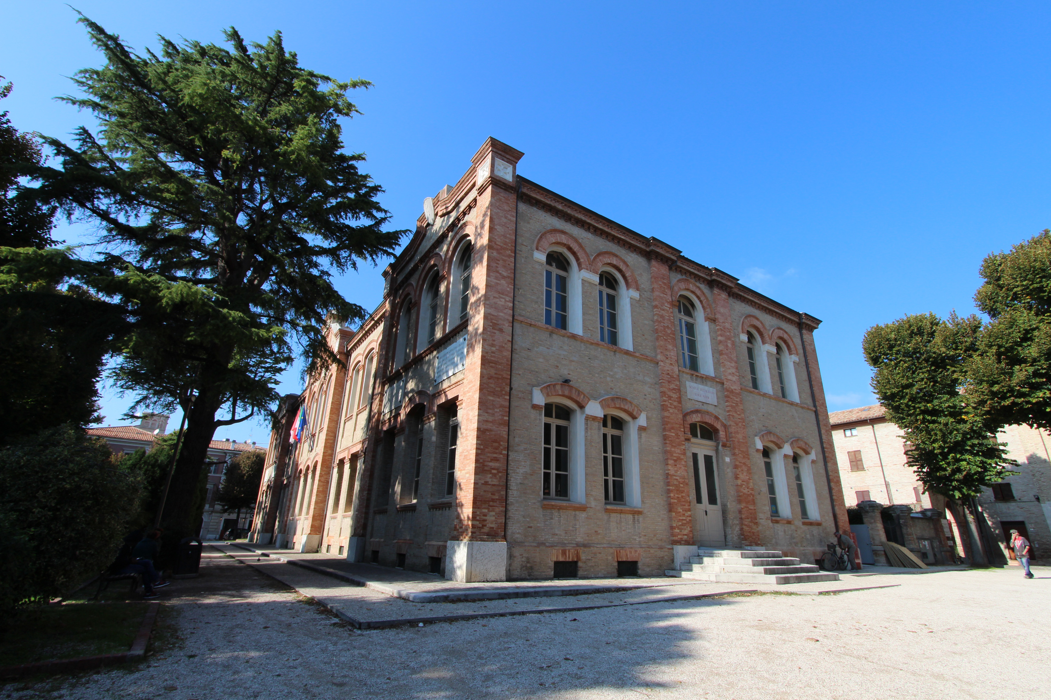 Mediateca Montanari, vista prospettica da S-E. L'edificio dagli inizi del Novecento fino al 1998 ha ospitato la scuola elementare intitolata a Luigi Rossi. L'edificio ha mantenuto intatta la struttura scolastica originaria organizzata in ampie aule e corridoi che ospitano oggi le collezioni della biblioteca.(Rif. Assessorato alle Biblioteche Comune di Fano) This is a photo of a monument which is part of cultural heritage of Italy.